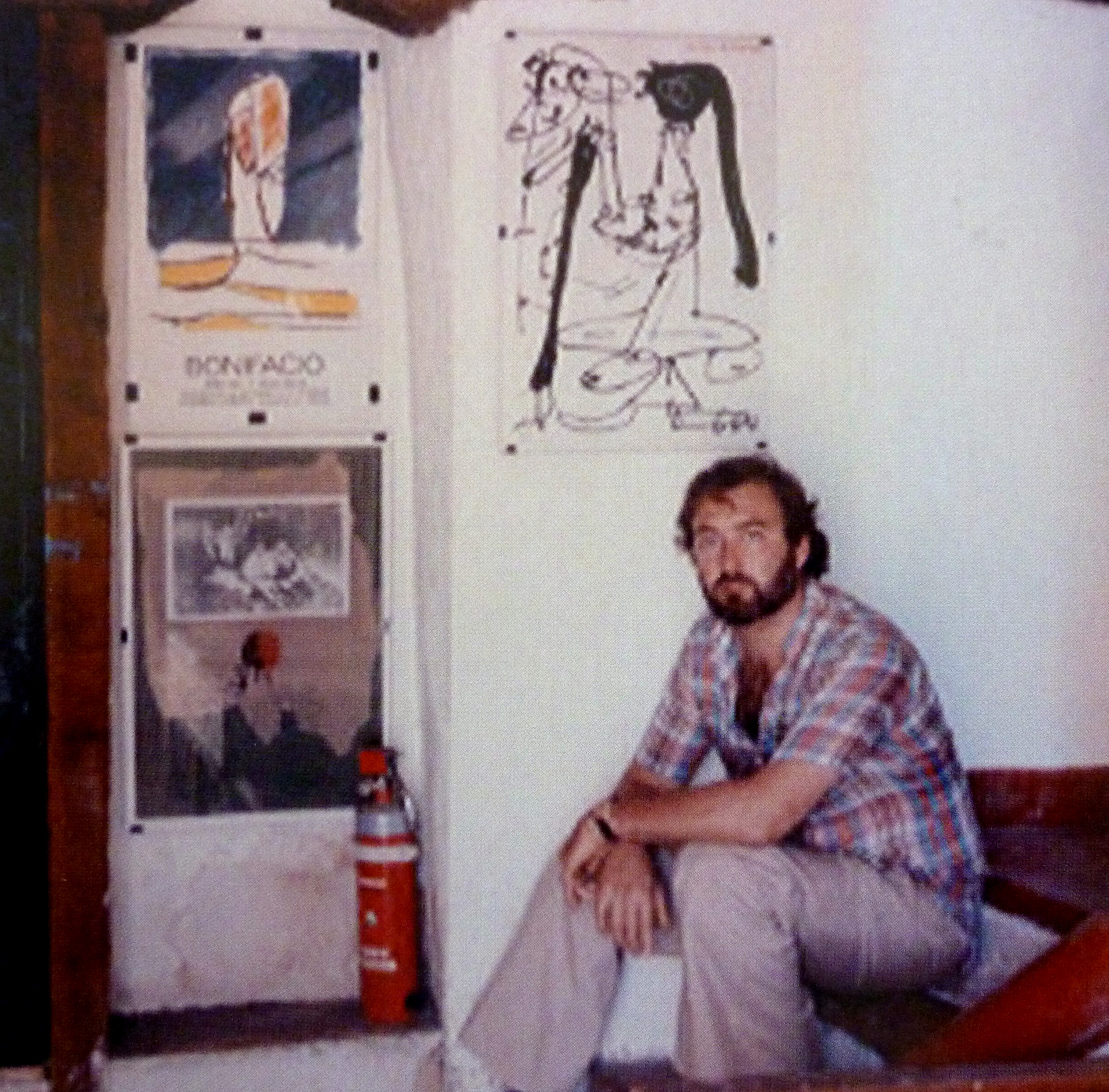 Javier Cebrián en su taller de serigrafía del barrio de Castillo, Cuenca